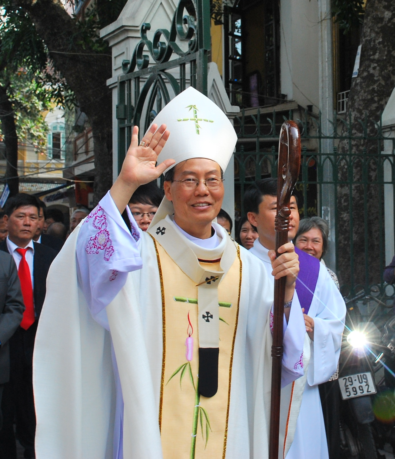 Đức TGM Giuse Ngô Quang Kiệt